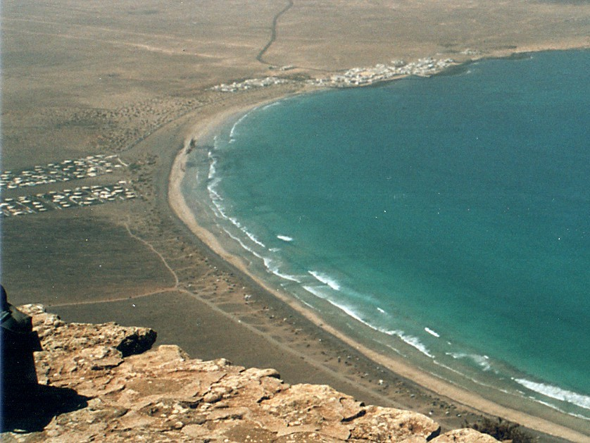 selbst fotografiert 2003